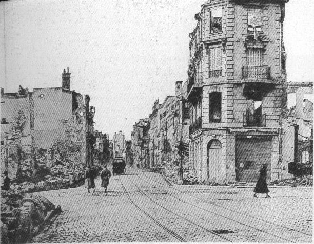 vue des destructions_de la Première Guerre mondiale dans la ville de Reims_: la rue de Talleyrand.